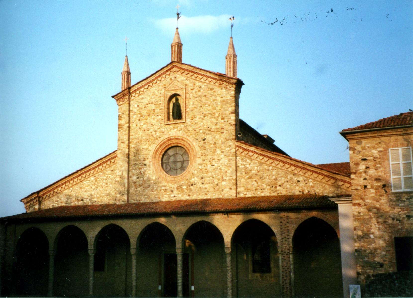 Fotografia della Basilica di San Colombano di Bobbio (PC)